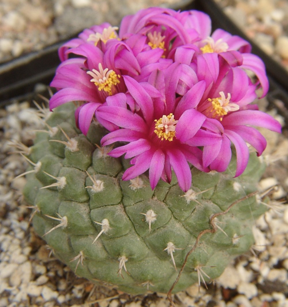 Strombocactus disciformis ssp. esperanzae in Blüte